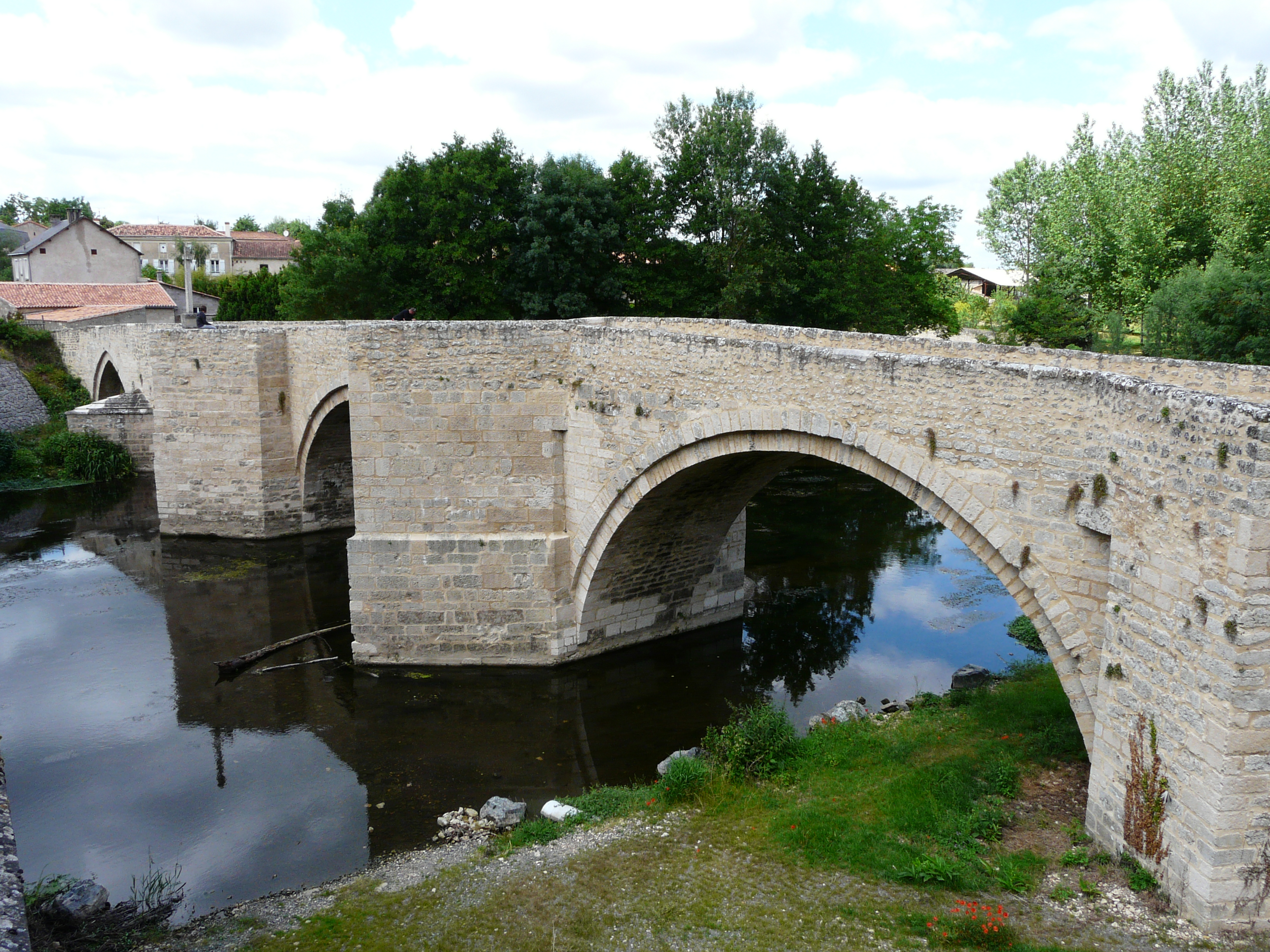 Le Thouet en amont du pont roman de Saint-Généroux, Deux-Sèvres, France